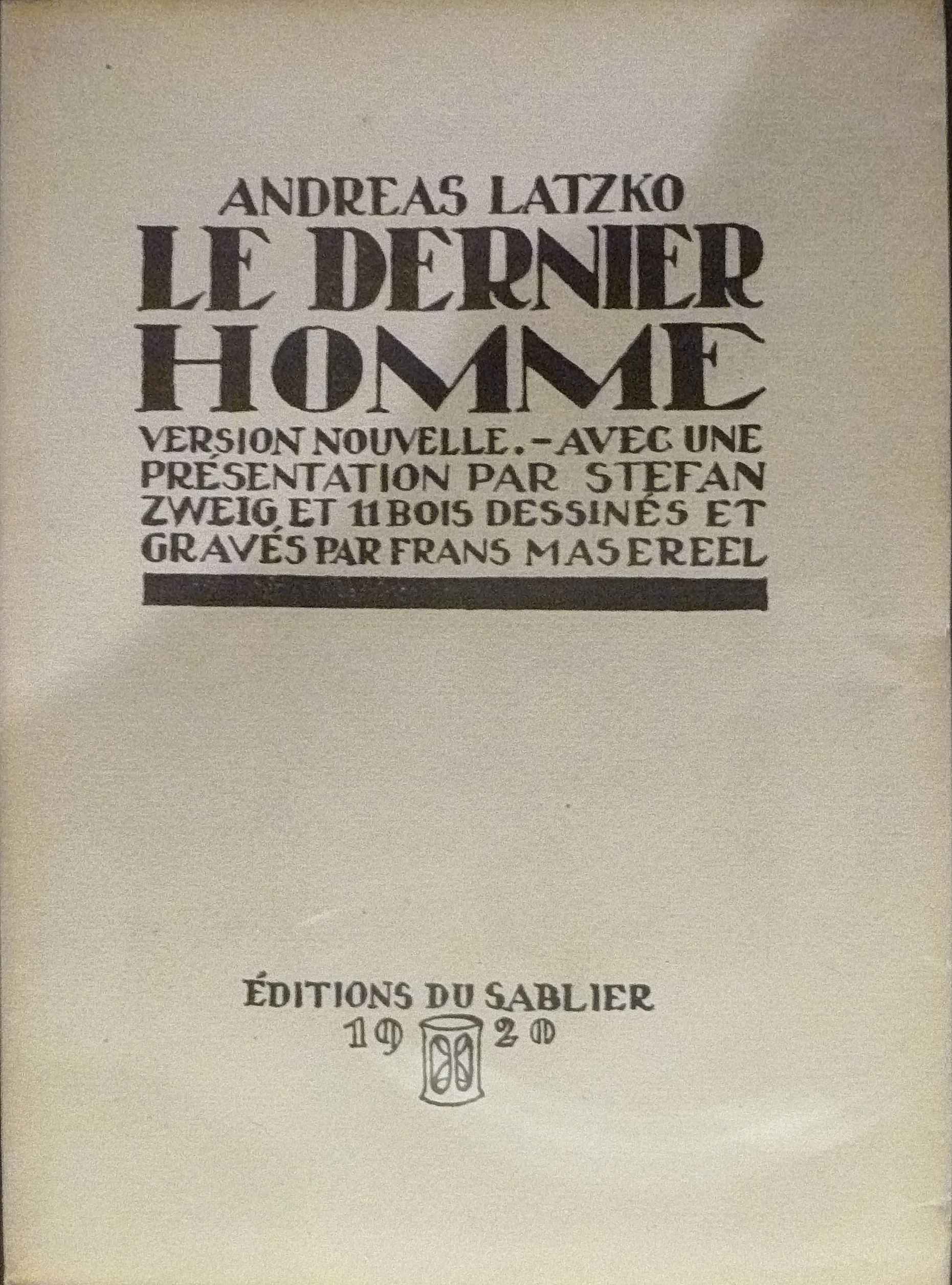 Andreas Latzko: Le Dernier Homme; Editions du Sablier, Génève, 1920